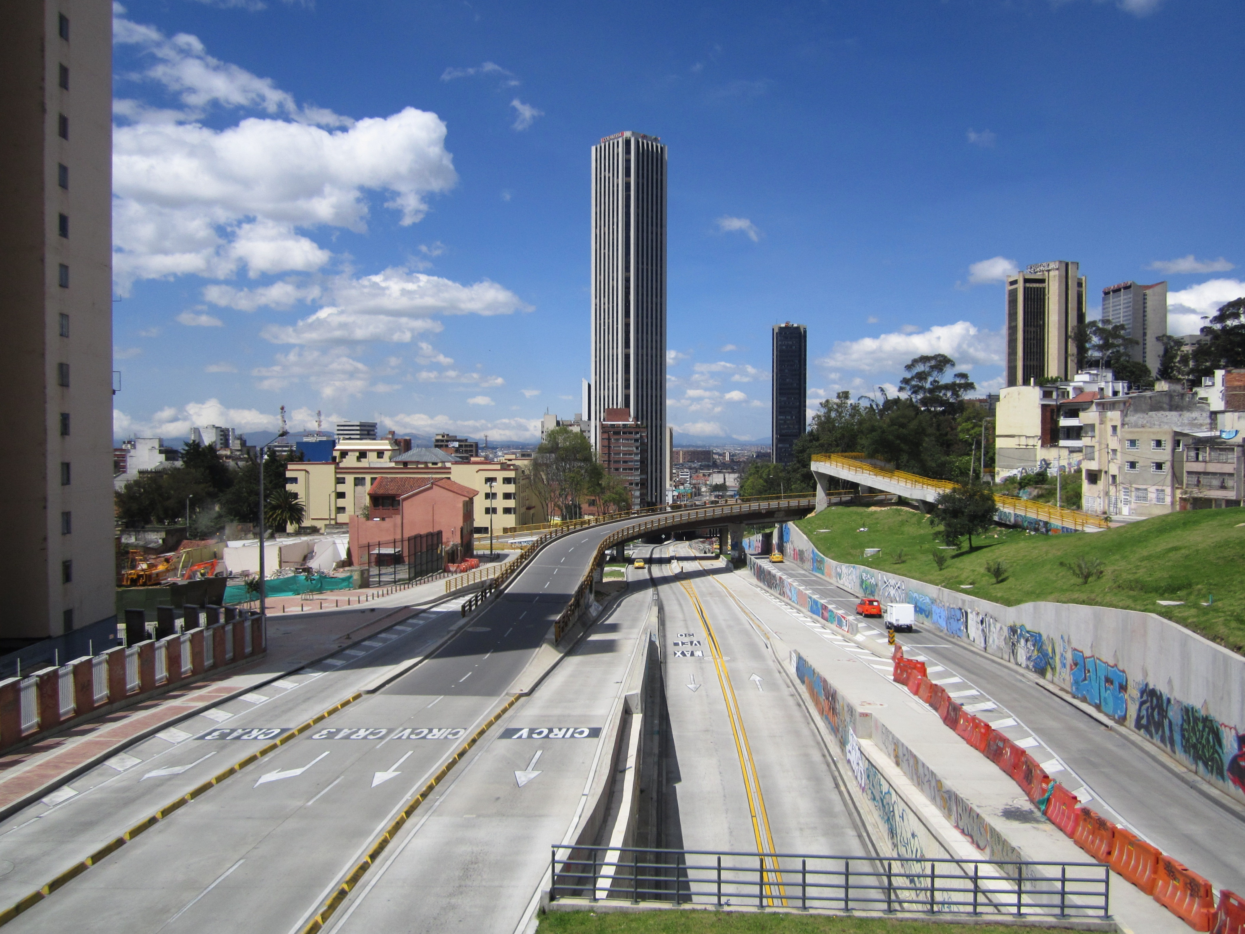 Bogota costado oriental de la torre Colpatria, vista desde el extremo oriental de la avenida calle 26.